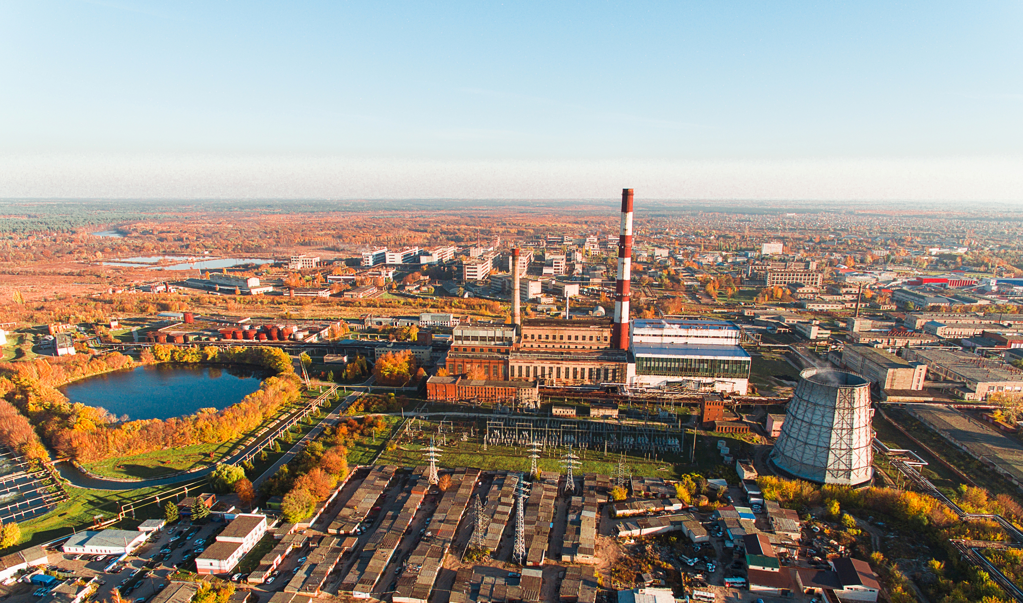 Тамбовская ТЭЦ вид сверху